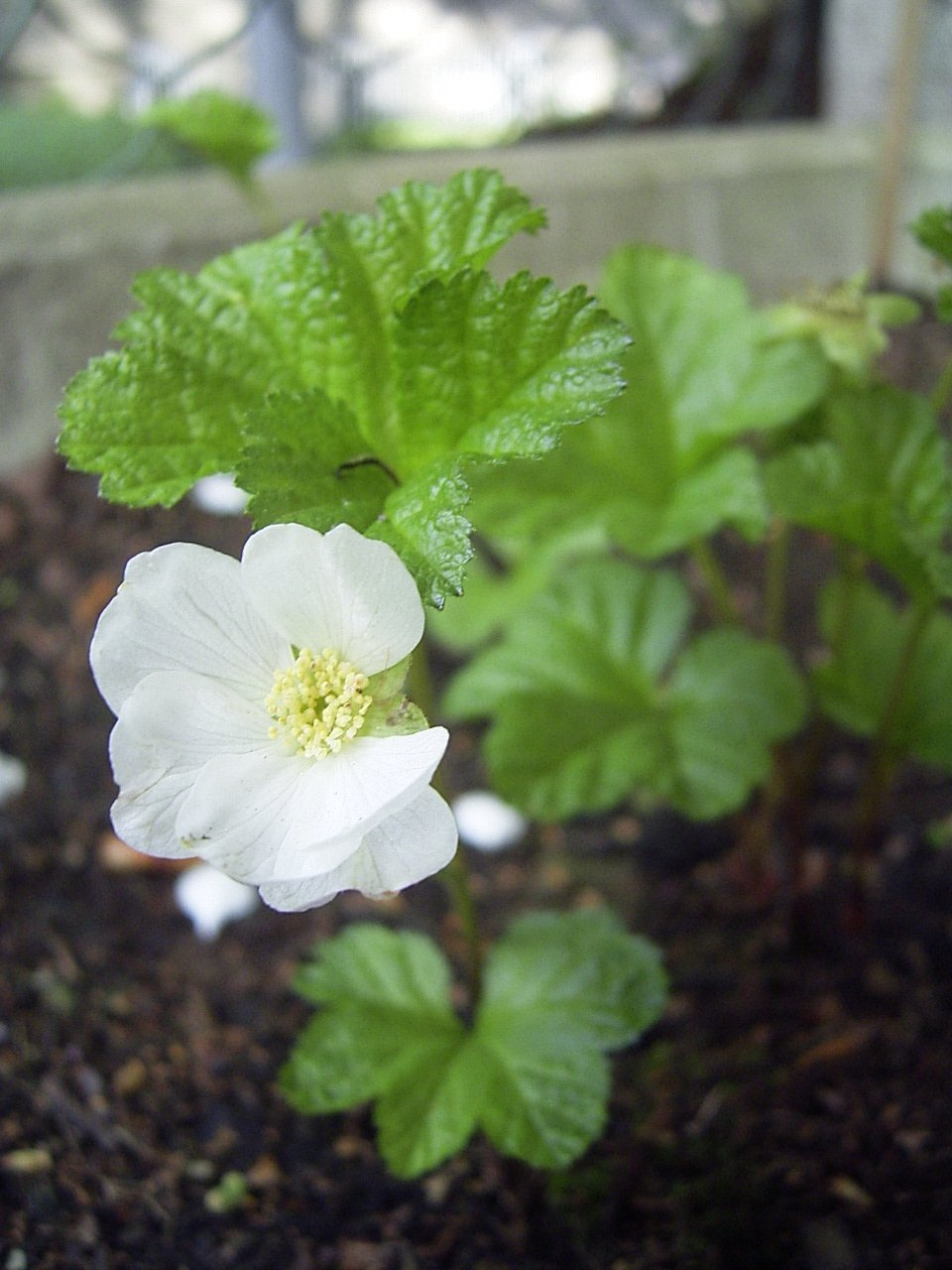 Blühende Rubus chamaemorus, weibliche Pflanze, Sorte 'Apolto'.